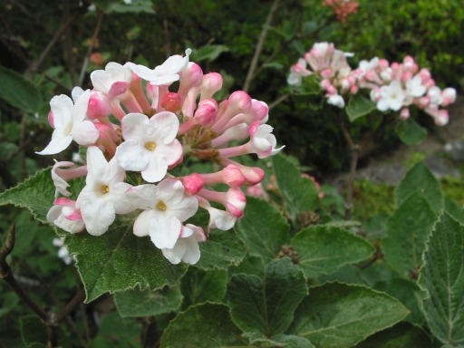 Viburnum carlesii, Jardin des Plantes, Paris